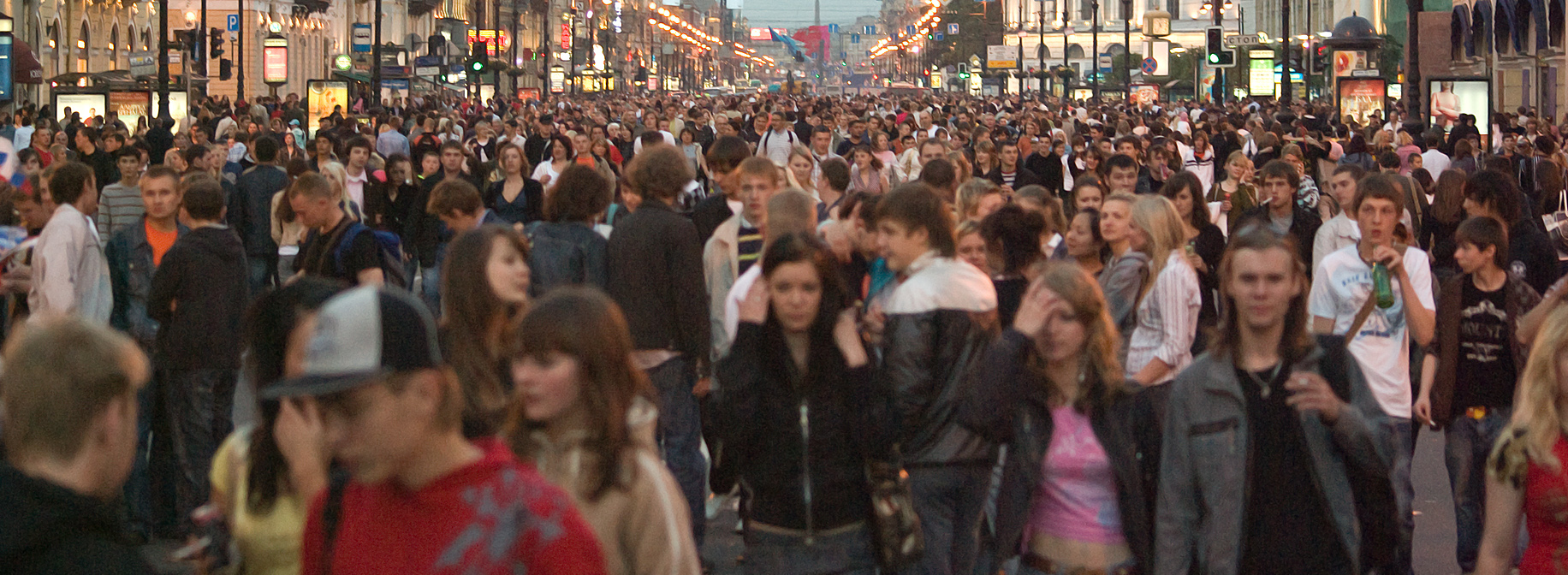 Алые паруса 2008 (Санкт-Петербург). На Невском проспекте от метро до Зелёного Моста.